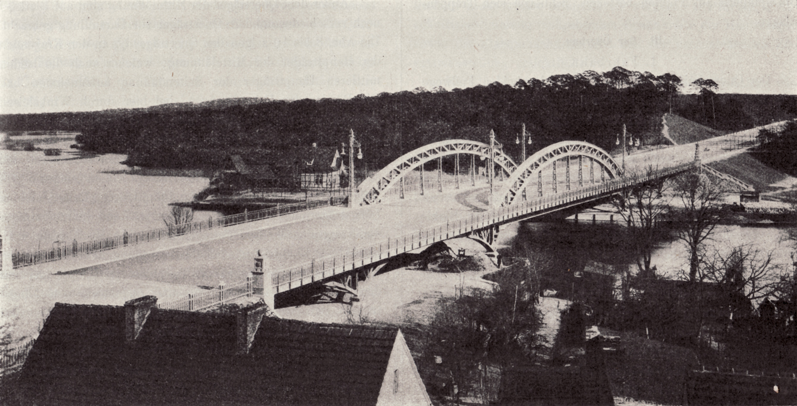 Berlin - Freybrücke, Ansicht 1911